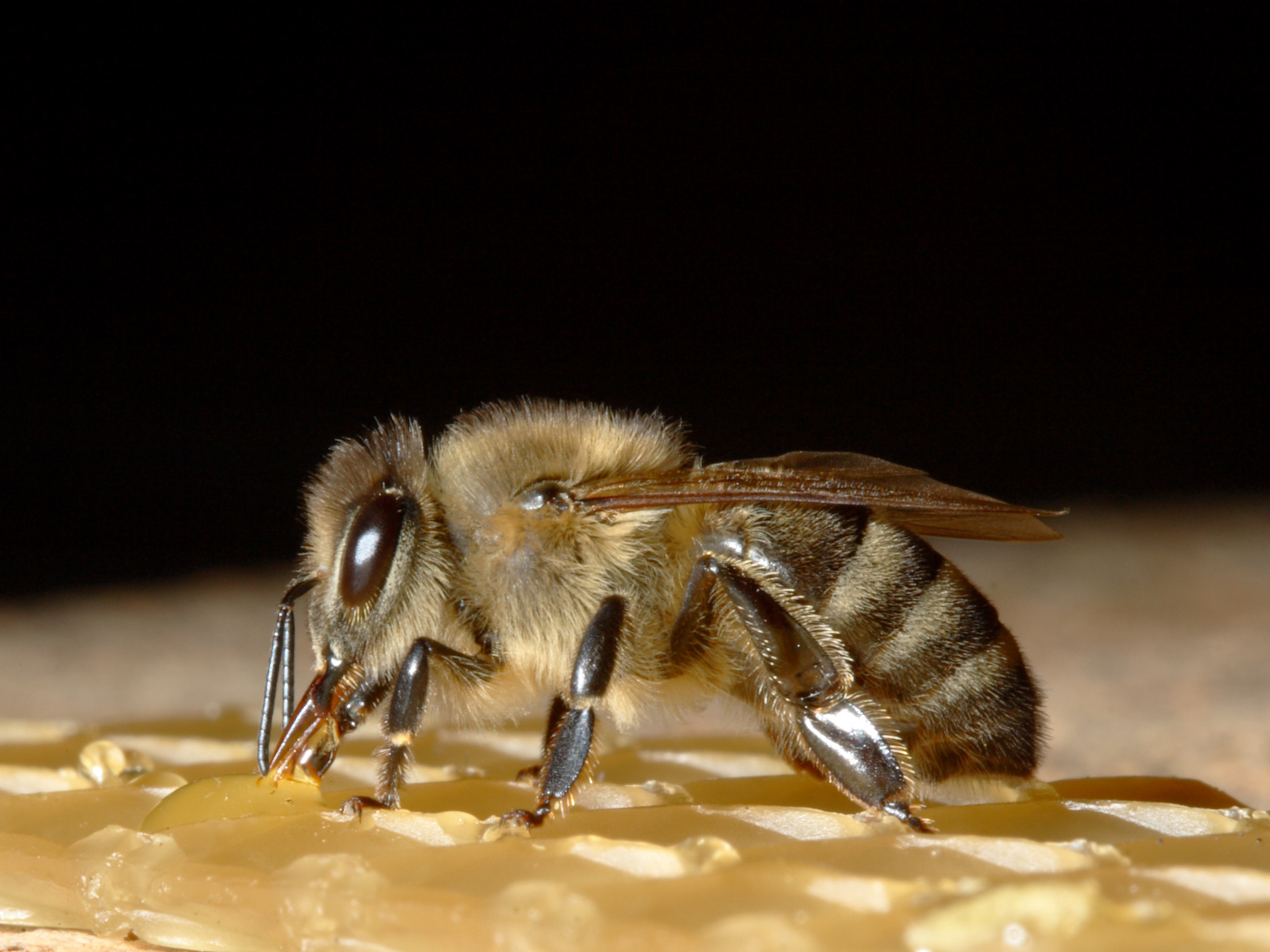 Westliche Honigbiene saugt an einem Honigtropfen